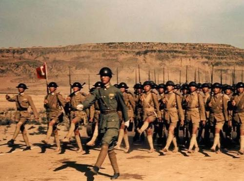 1943年ビルマでの国民革命軍。パレードで英式ヘルメットを被り行進する一小隊。当時としては貴重なカラー写真で撮影されており、生地の詳細な色合いが分かる。